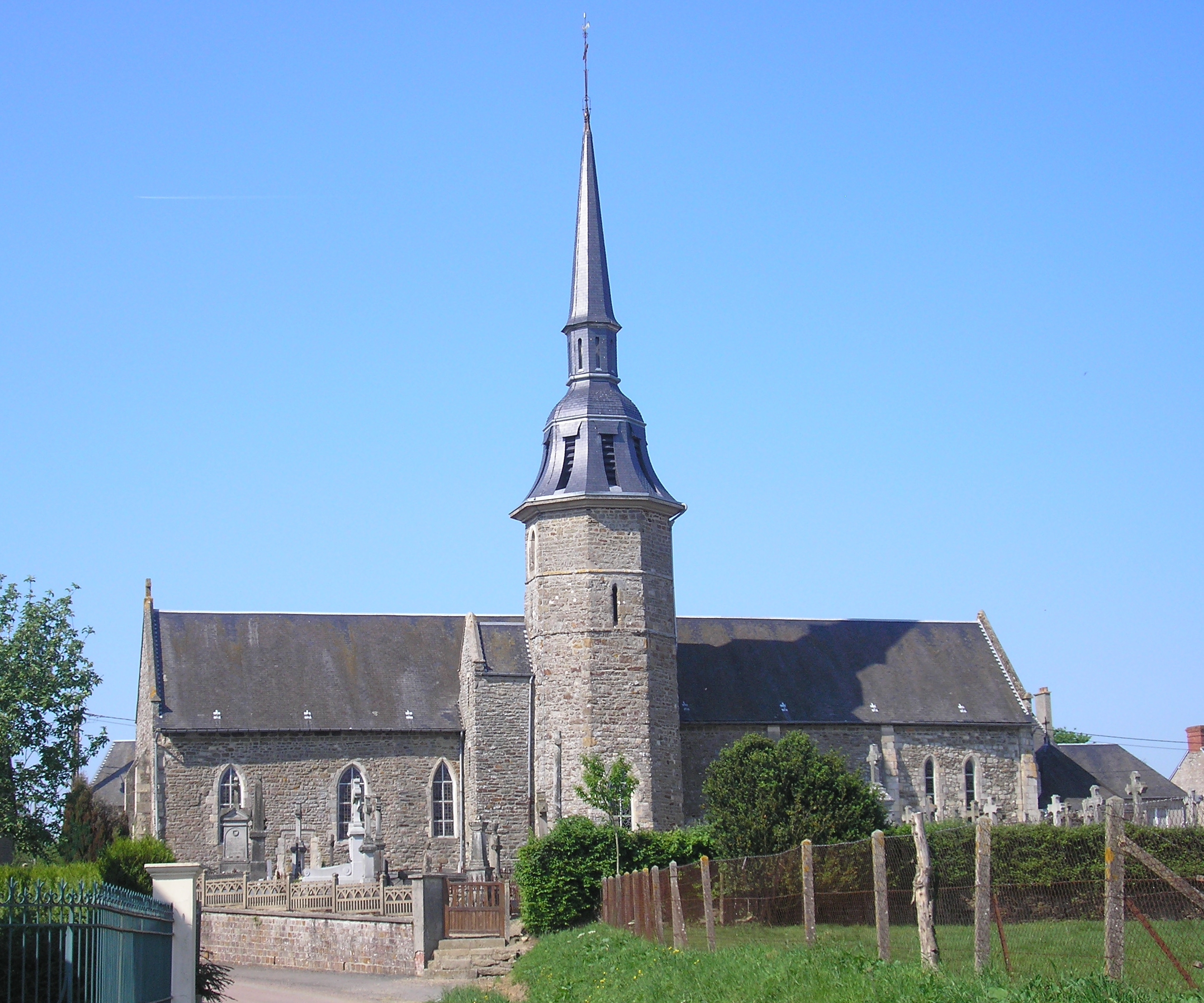 Saint-Jean-le-Blanc (Normandie, France). L'église.